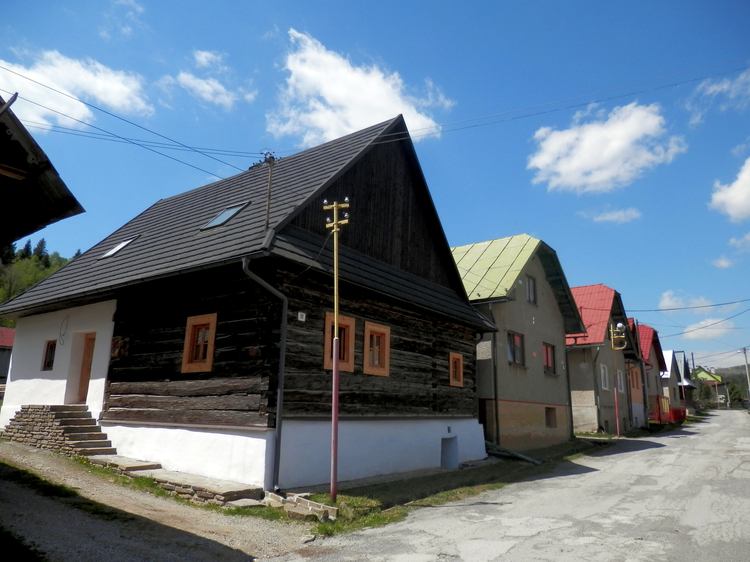 Pôvodná dedinská zástavba. Obec Torysky, okres Levoča.